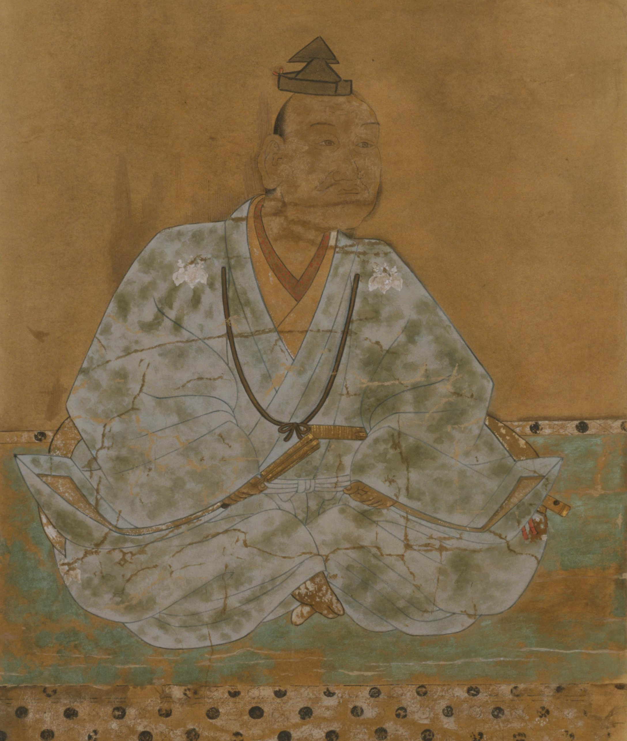 蜂須賀正勝の肖像。